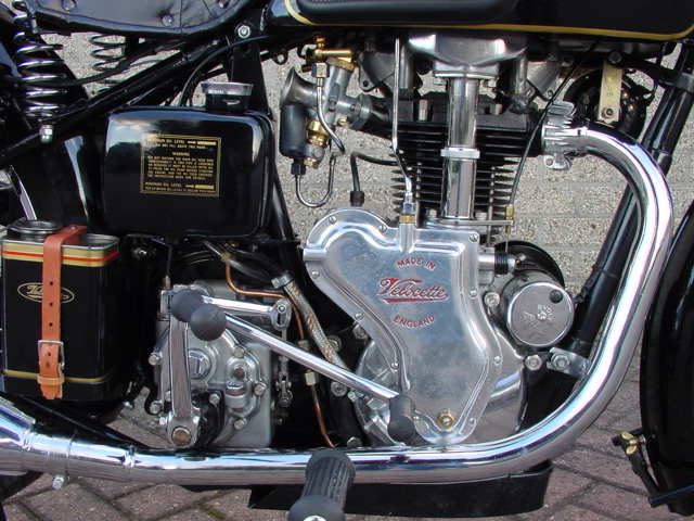 Toestemming van Yesterdays Antique Motorcycles